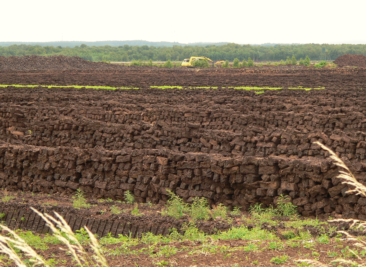 Torfsoden im Aschener Moor